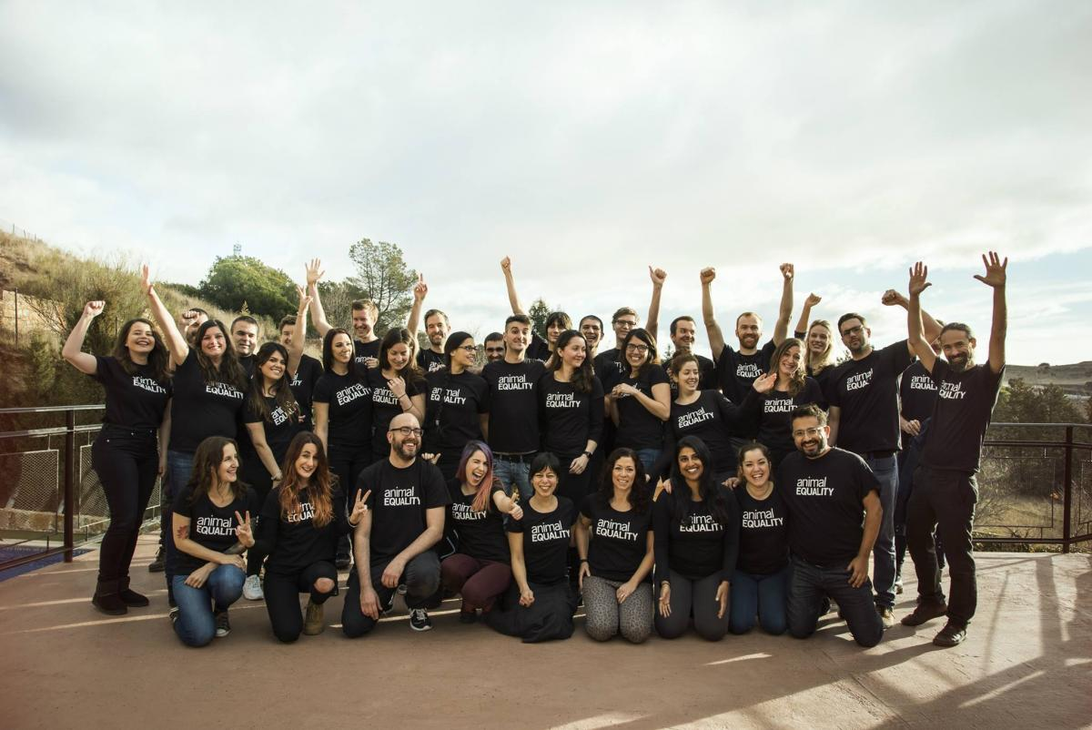 Fundada en el 2006 en Madrid, Igualdad Animal trabaja actualmente en 8 países.